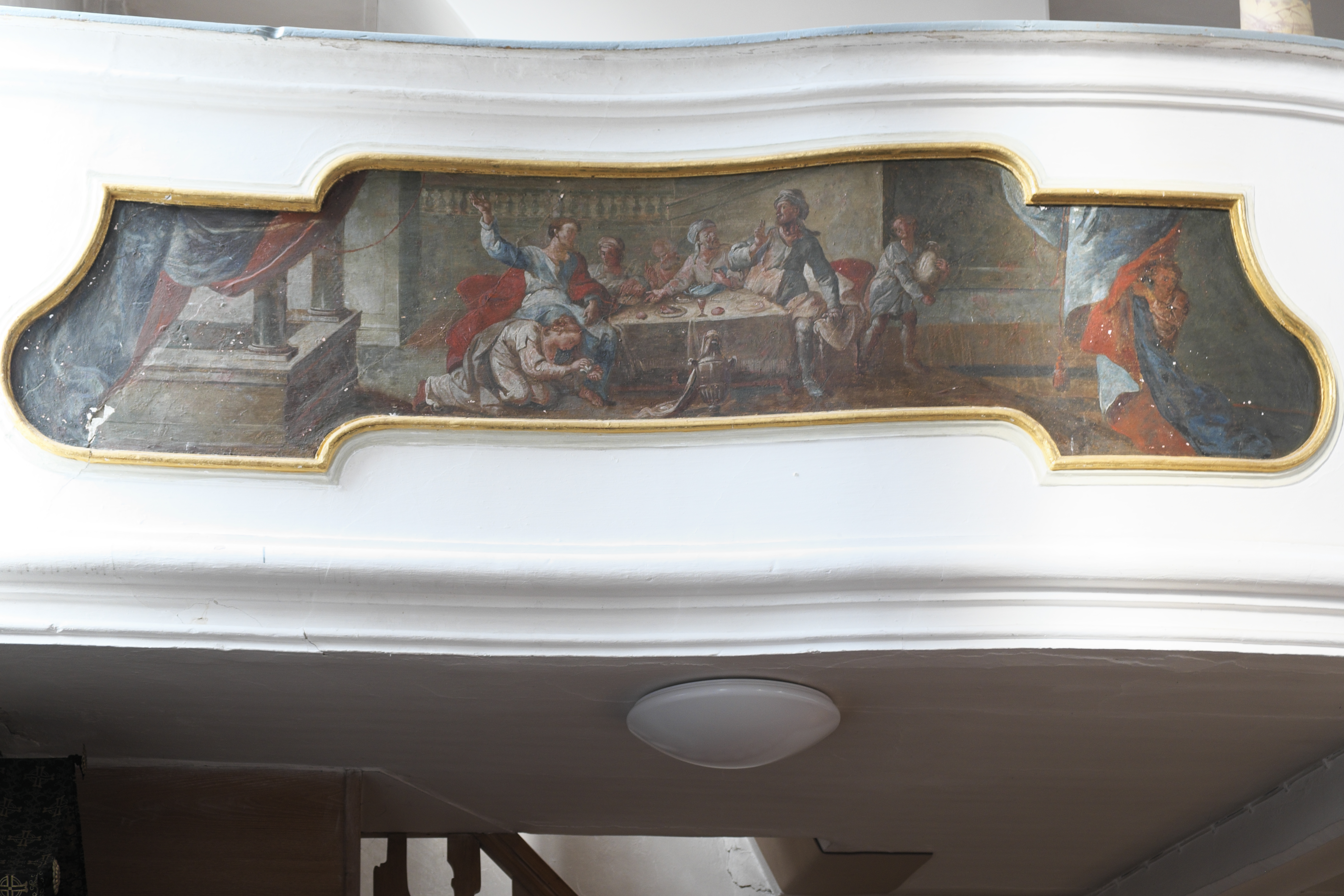 Katholische Pfarrkirche Zur Schmerzhaften Muttergottes in Waalhaupten (Waal) im Landkreis Ostallgäu (Bayern/Deutschland), Gemälde der Emporenbrüstung, Mitte 18. Jahrhundert